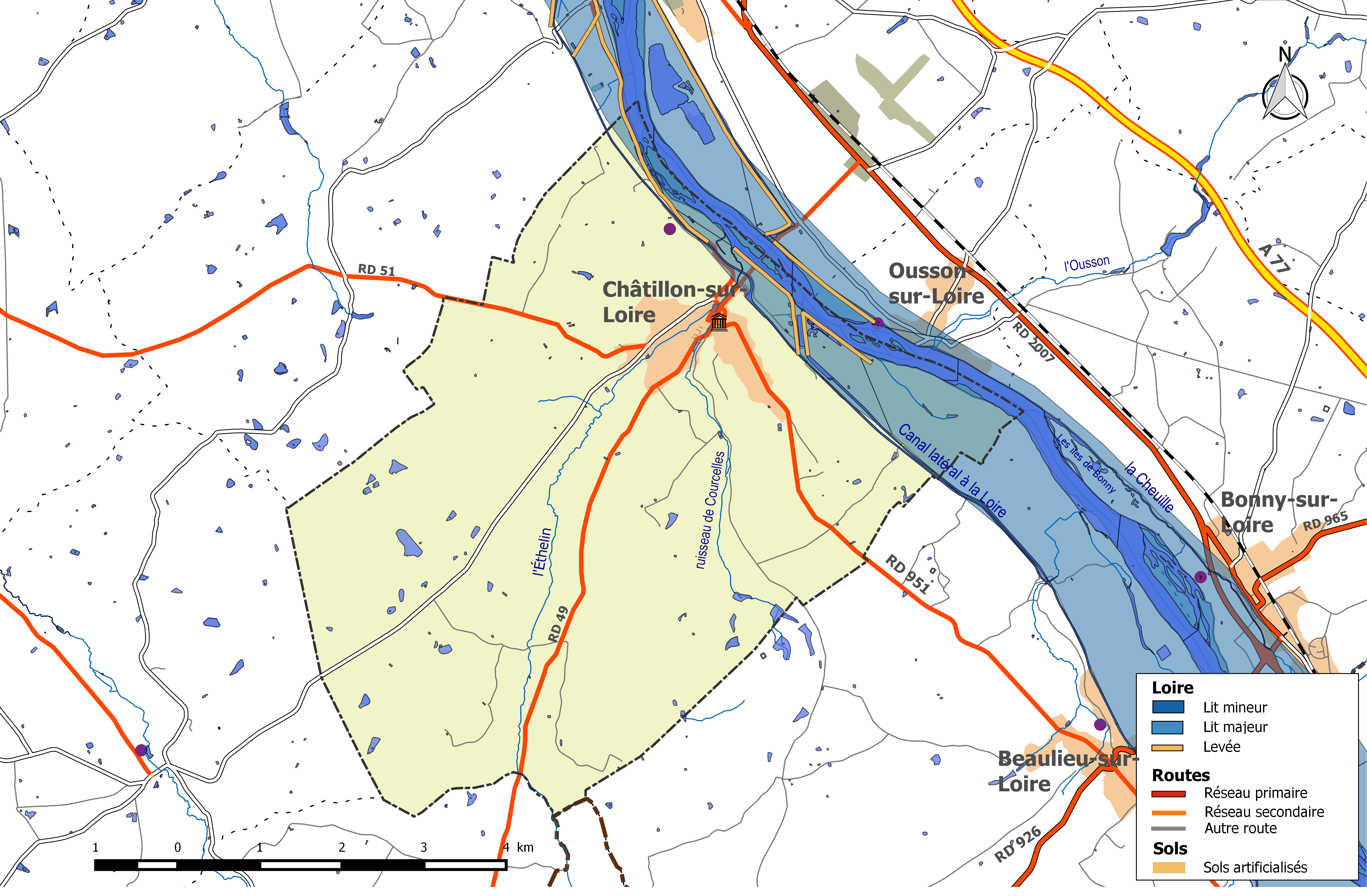 Zone inondable et réseaux hydrographique et routier de la commune de Châtillon-sur-Loire